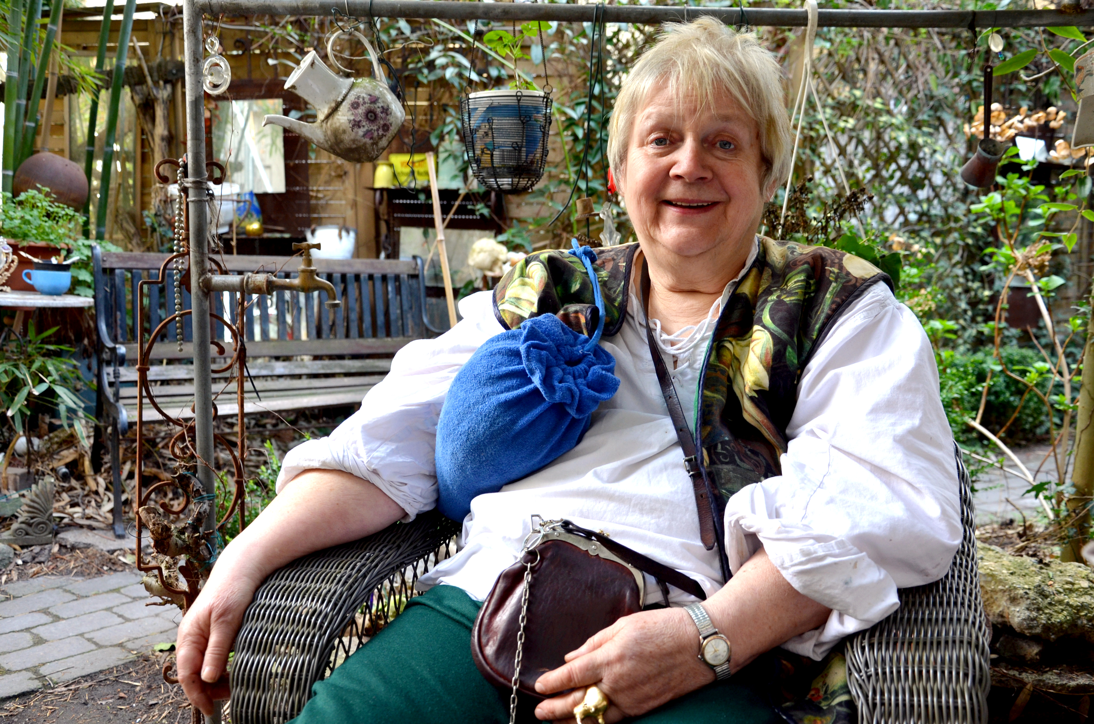 Die Künstlerin Dietlind Preiss im Frühjahr 2014 in ihrem Hinterhof-Garten in der Sedanstraße 34 in Hannover, Stadtteil Oststadt ...